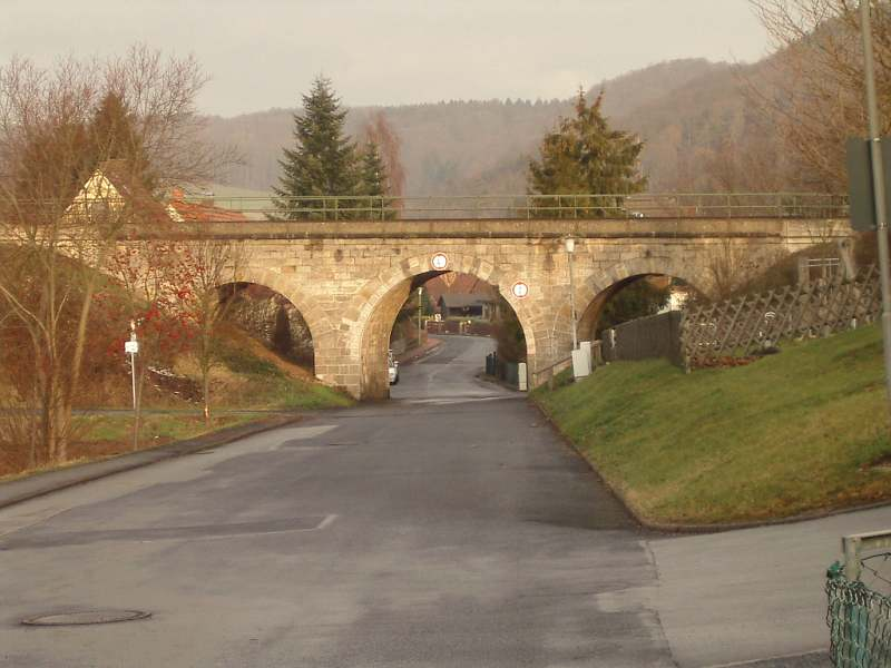 Heckershausen, rundbogige Eisenbahnbrücke aus Quadermauerwerk; groß.